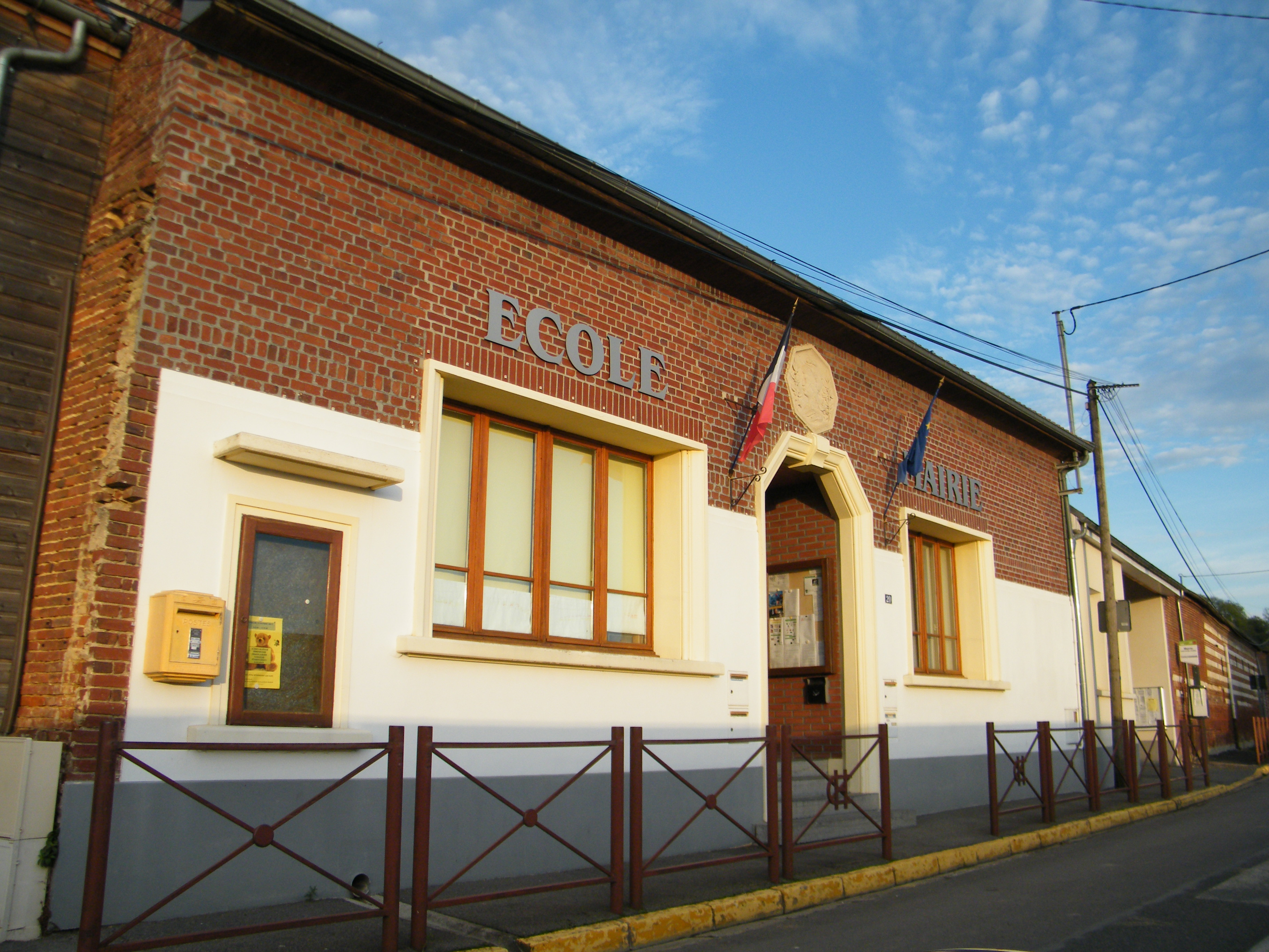 Mairie.